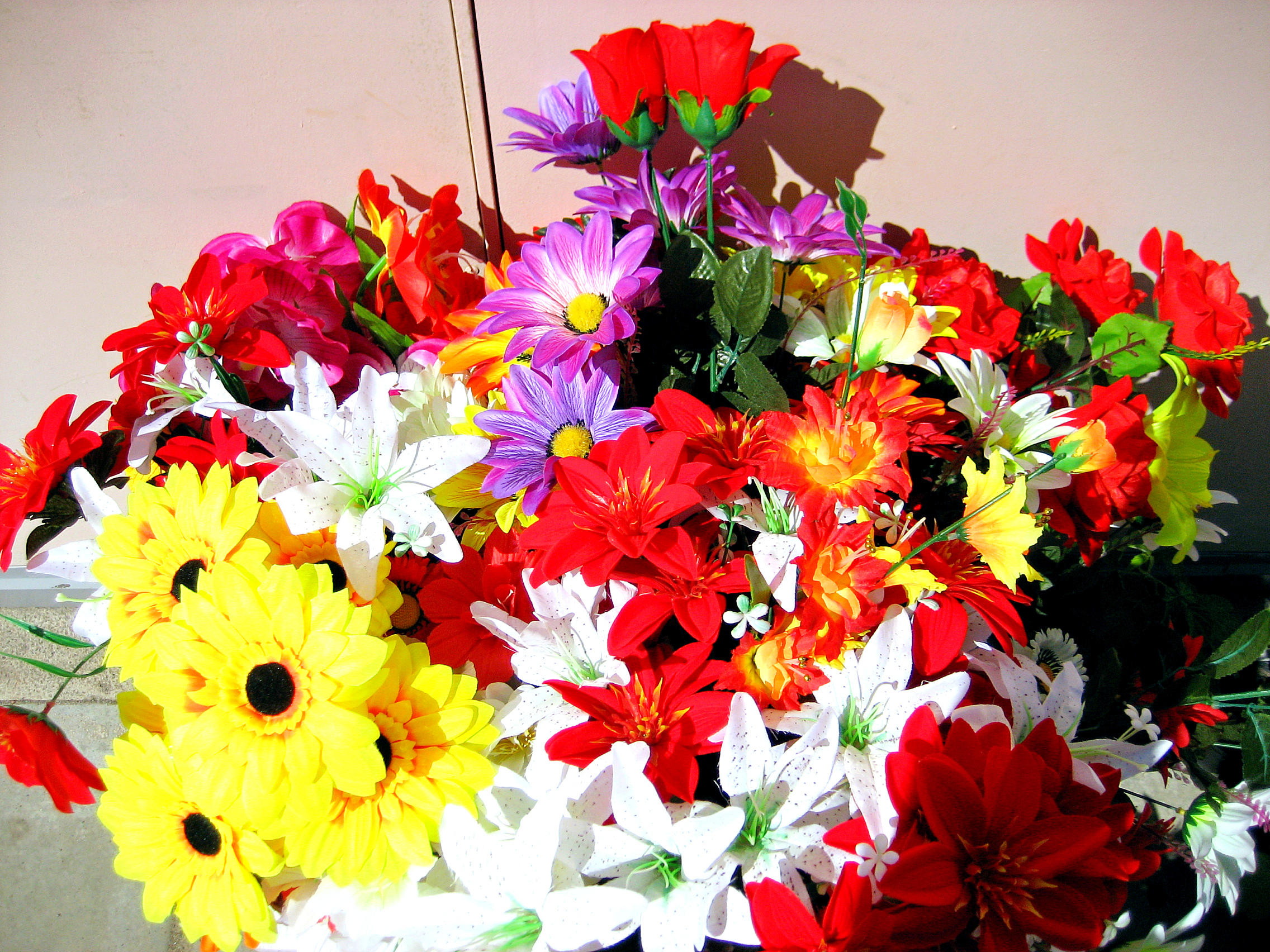 Искуственные цветы. Фото А. Щекинова